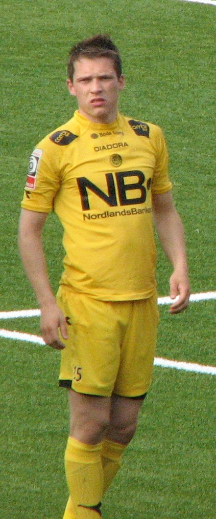 Thomas Jacobsen(Glimt) under oppstillingen til BOdø/Glimt-Sogndal.